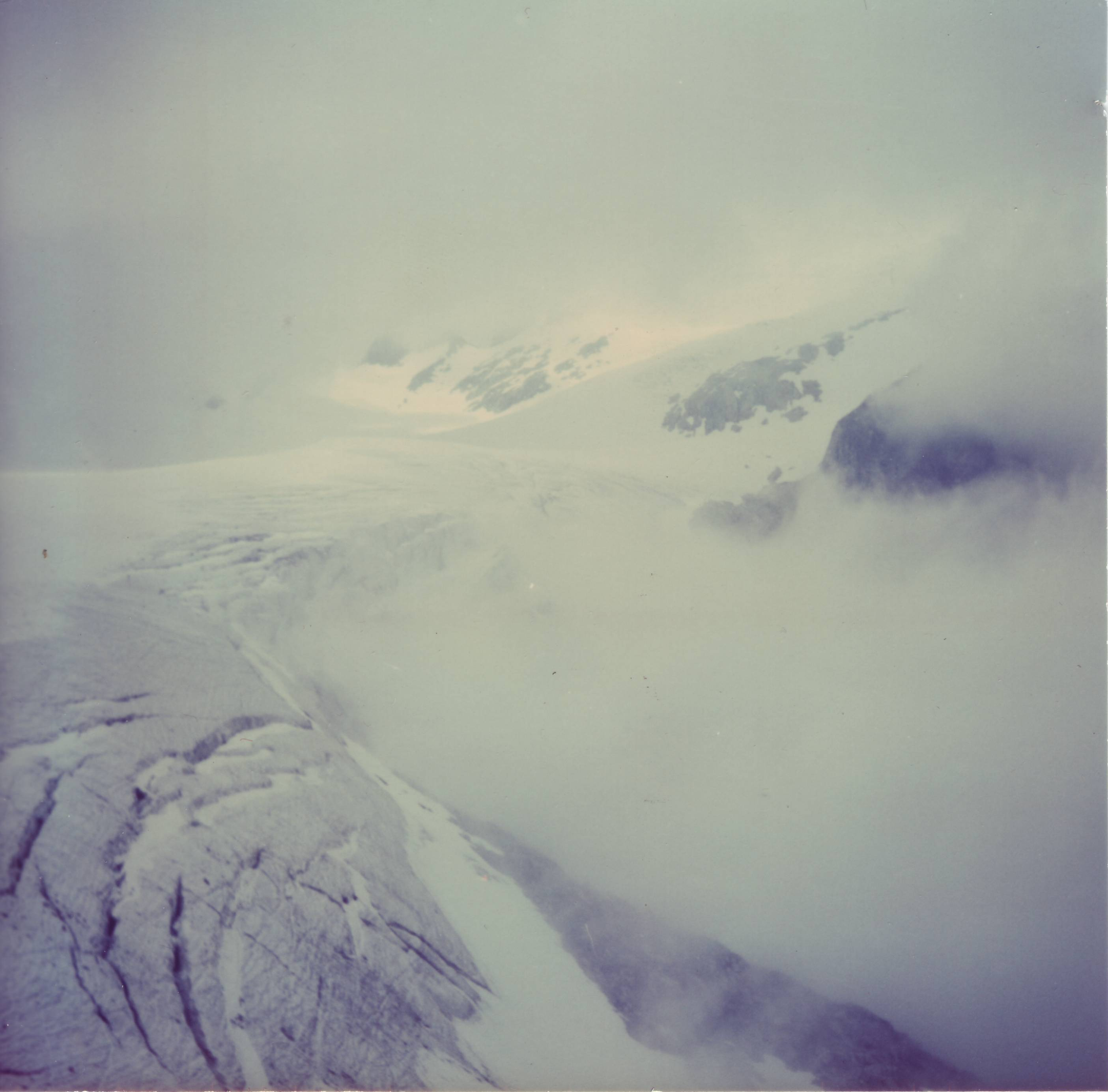 Brunni Glacier, Maderanertal, Switzerland, in July 1972 - Brunni-Glačero, Maderanertal, Svislando, en julio 1972